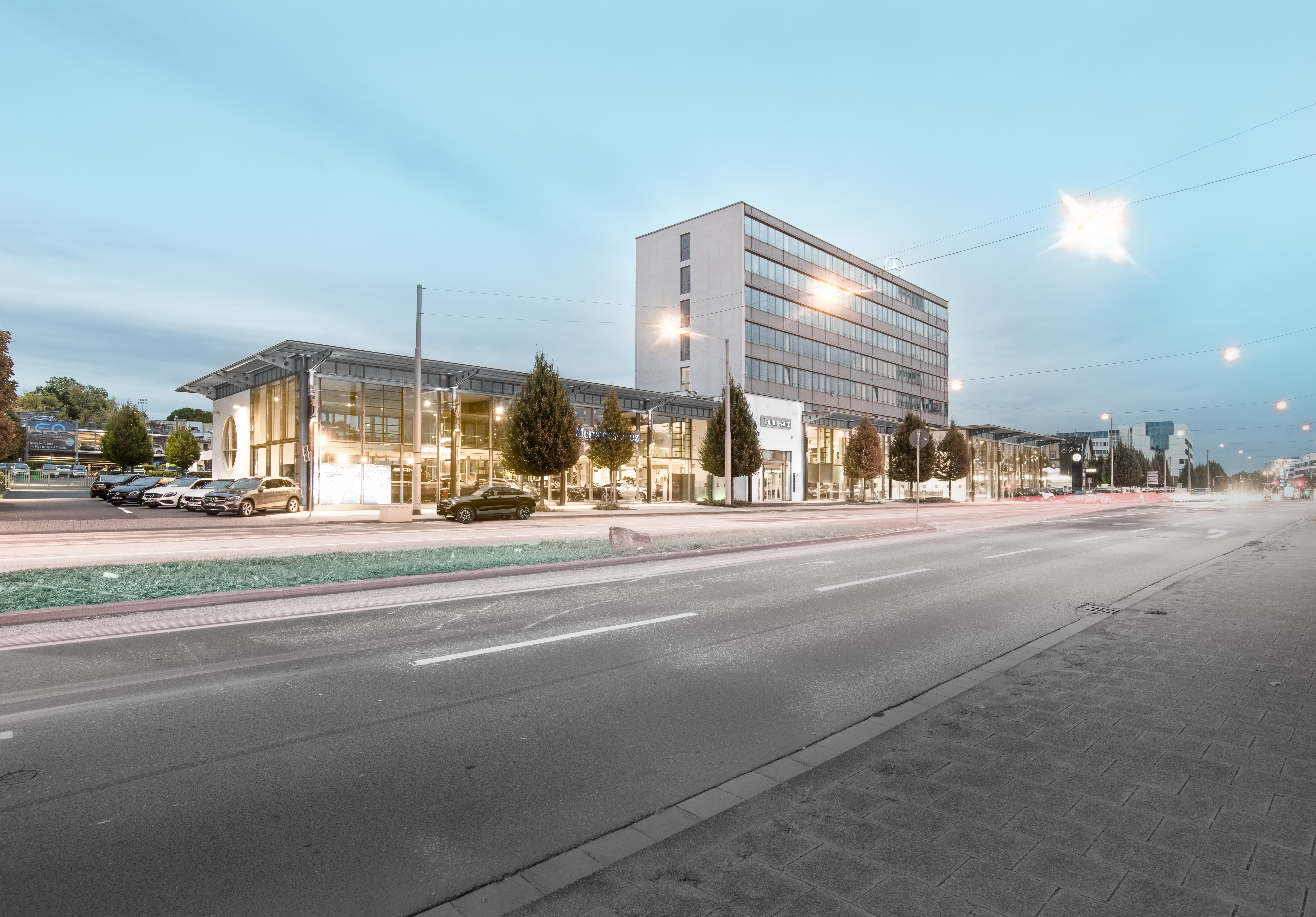 Das Foto zeigt den Hauptbetrieb der Taunus-Auto-Verkaufs-GmbH aus dem Jahr 2017 in der Mainzer Straße 82-92 in Wiesbaden.